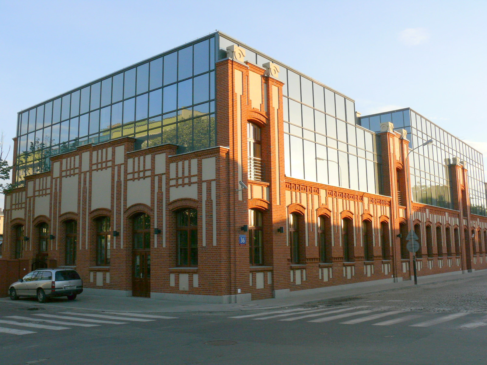 Centrum Kształcenia Międzynarodowego Politechniki Łódzkiej ul. Żwirki 36, Łódź